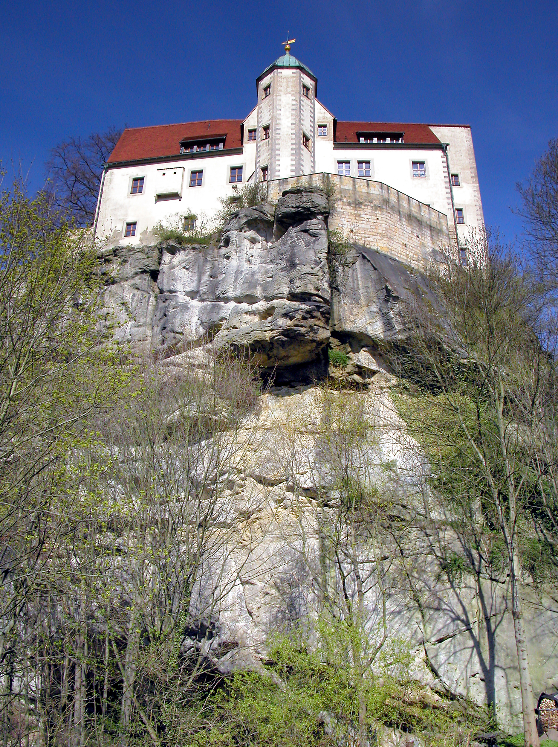 21.04.2012 01848 Hohnstein: Burg (GMP: 50.976628,14.109229). Ursprünge im 15 und 16. Jahrhundert. Blick von Süden aus den Bärengarten-Tal zur Burg Hohnstein. [DSCNn3759.TIF]20120421010DR.JPG(c)Blobelt